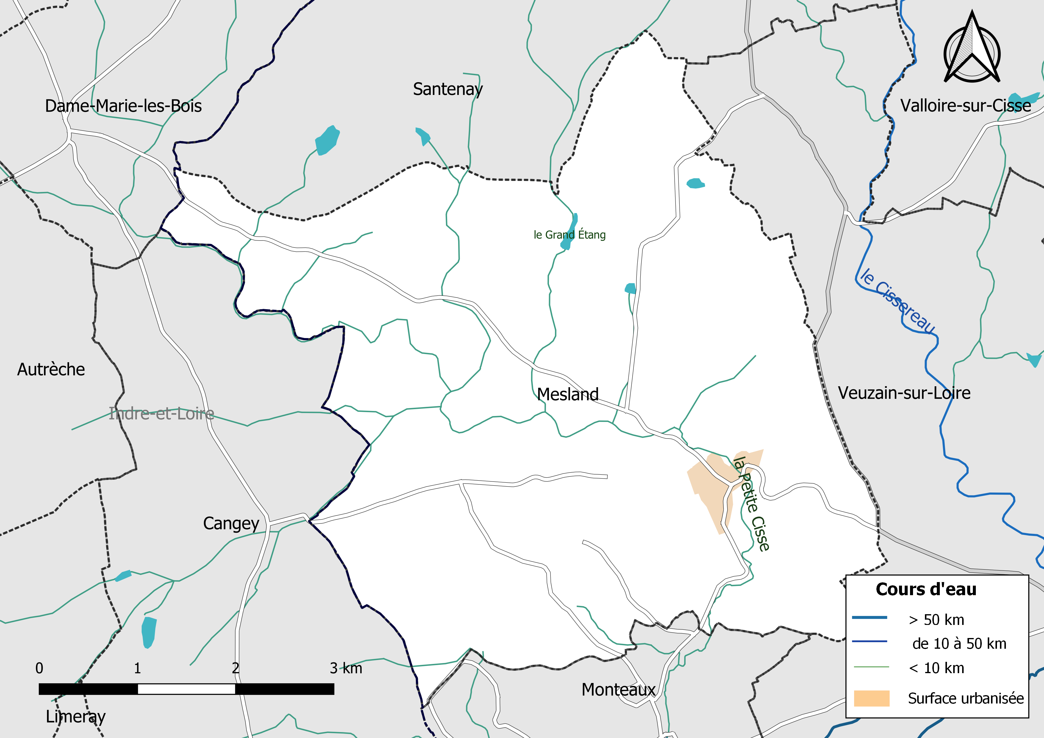 Carte du réseau hydrographique de la commune de Mesland (Loir-et-Cher, France).